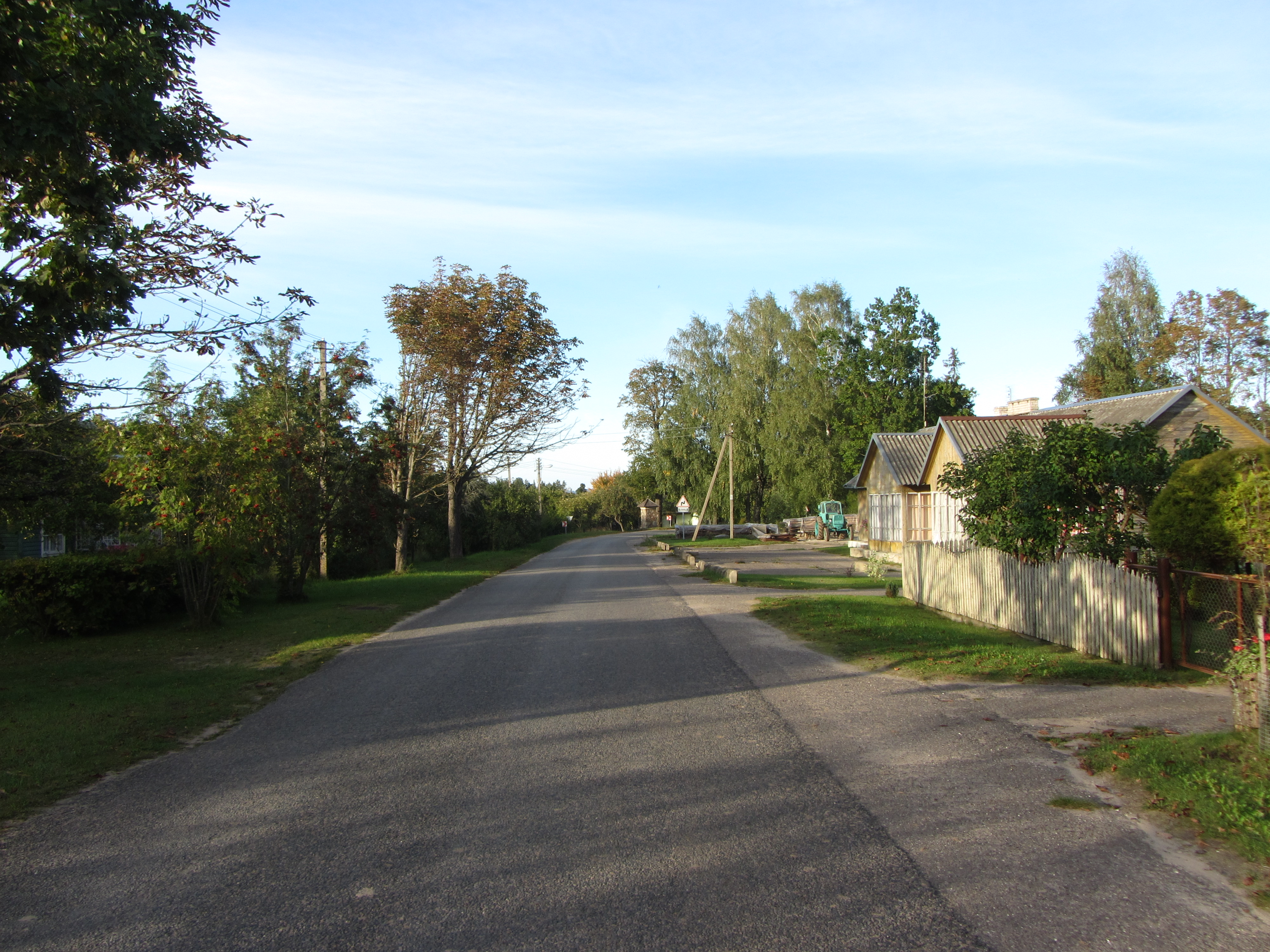 Šventa, Lithuania